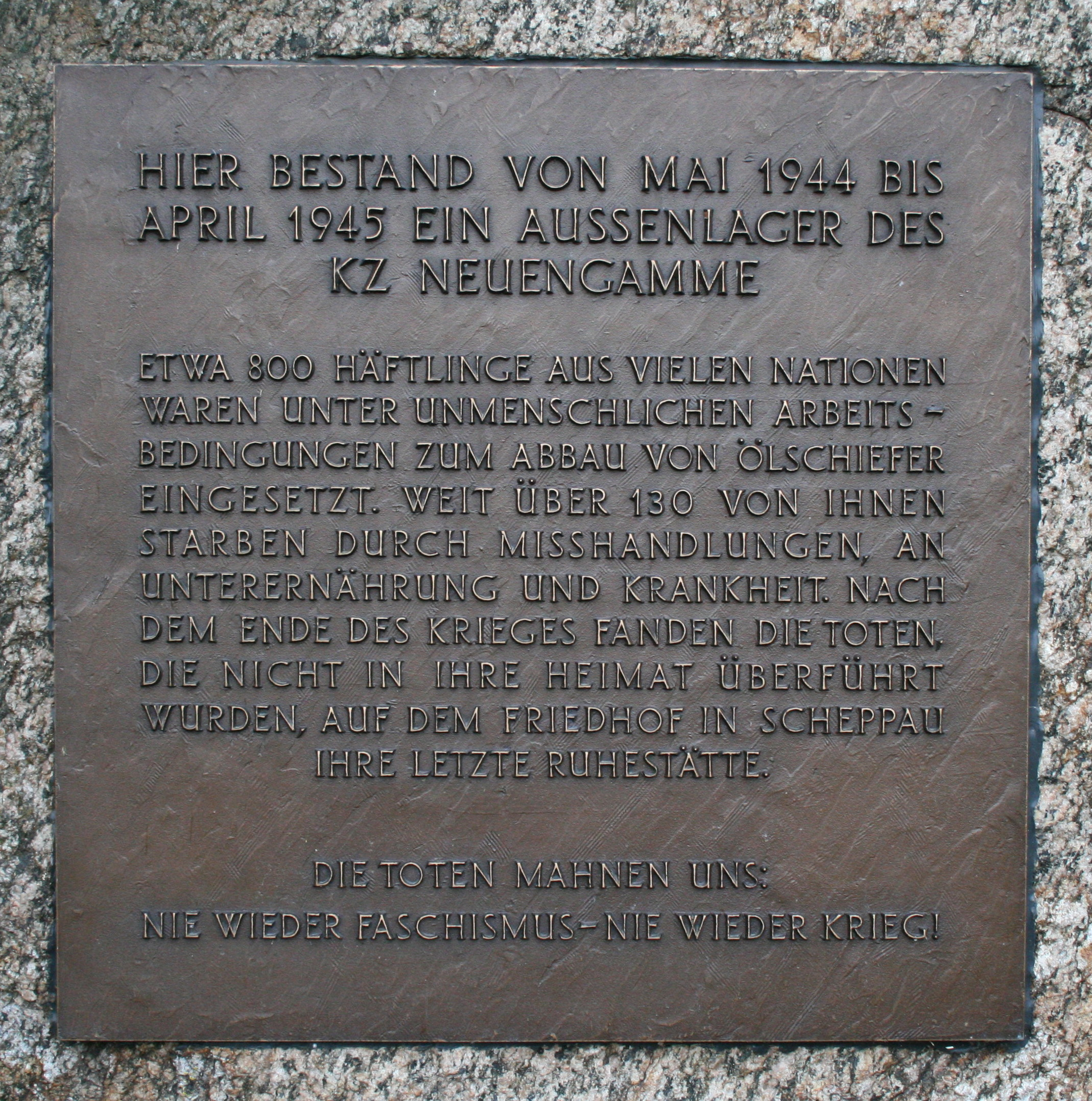 KZ Schandelah, Bronzetafel am Lager